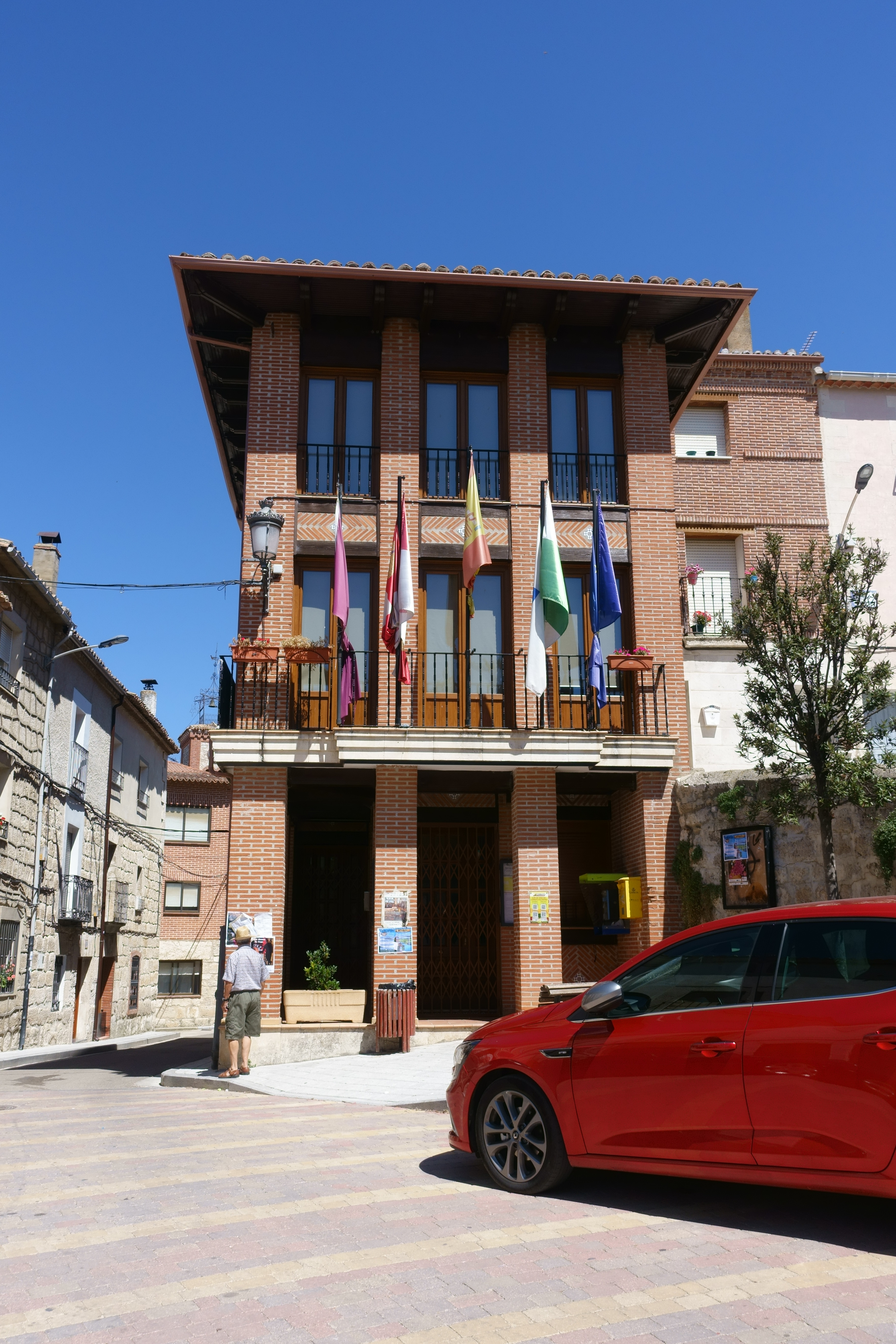 Casa consistorial de Antigüedad (Palencia, España).